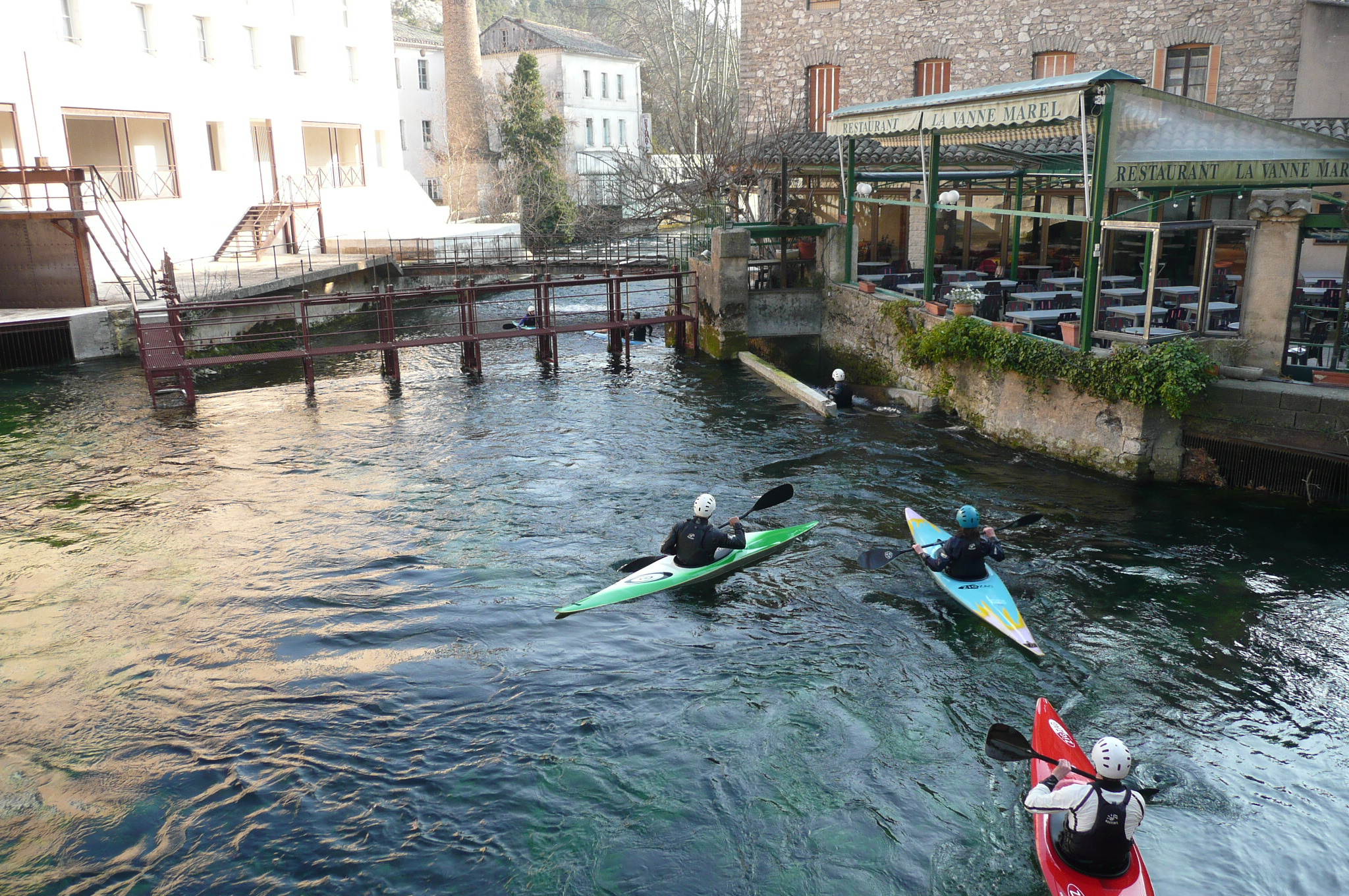 Kayakiste sur la Sorgue à Fontaine de Vaucluse.